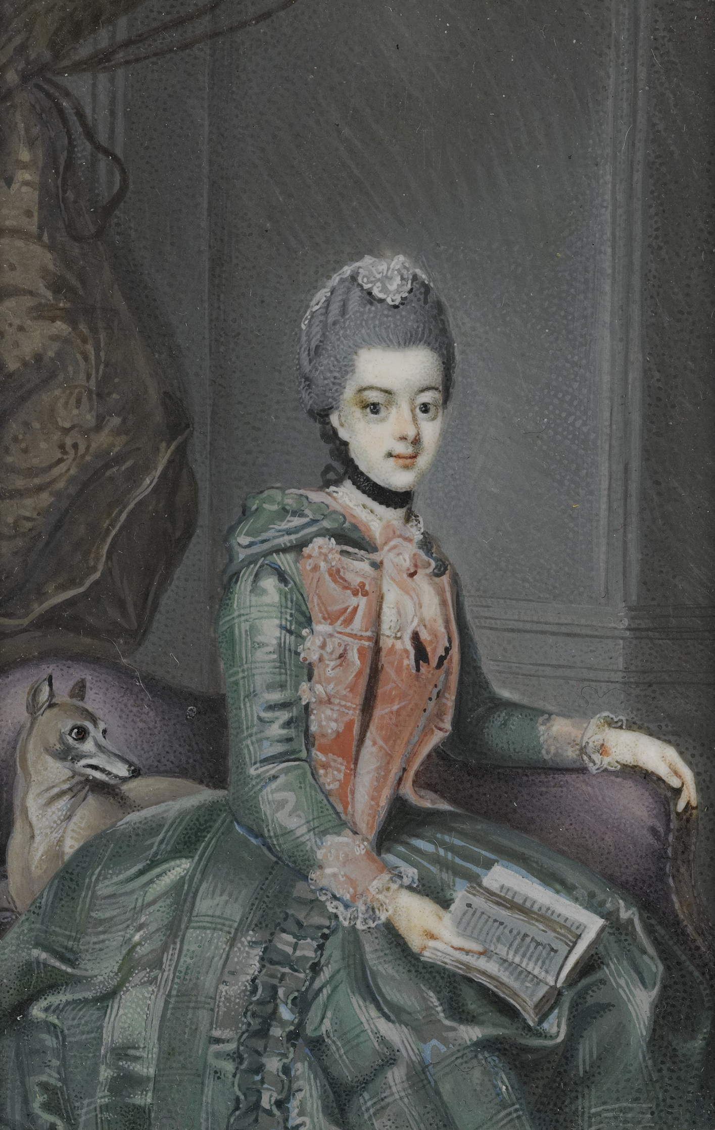 Portret van Frederika Sophia Wilhelmina (1751-1820), prinses van Pruisen. Echtgenote van prins Willem V. Kniestuk, zittend op een sofa, opkijkend uit een opengeslagen boek in de rechterhand, links op de bank een hond. Naar het origineel door Johann Georg Ziesenis in het Mauritshuis. Onderdeel van de collectie portretminiaturen.